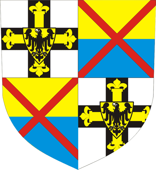 Teutonic Order - Coat of Arms of the Grandmaster Wappen des Hochmeisters des Deutschen Ordens Paul von Rusdorf